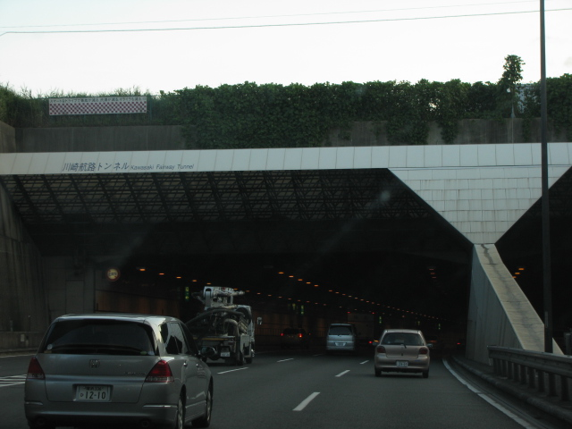 2009年8月11日、川崎航路トンネル付近で湾岸線西行き方面より撮影